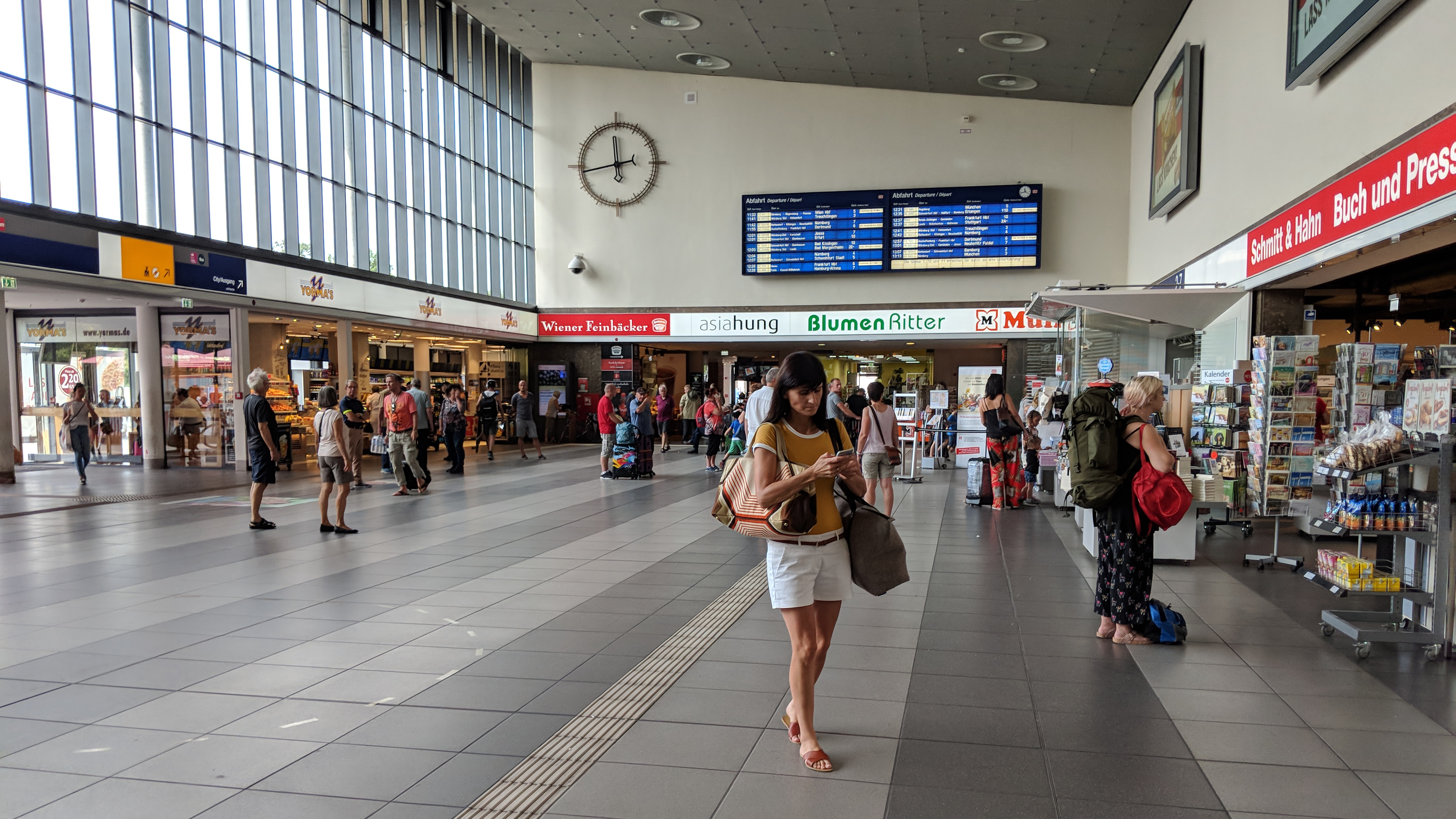 Der Würzburger Hauptbahnhof